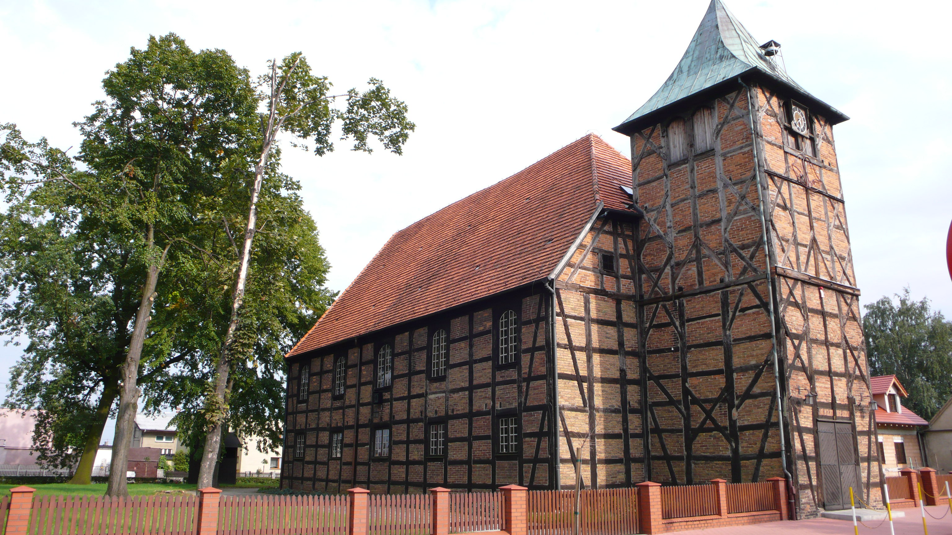 Kościół w Zaborowie fot. 2